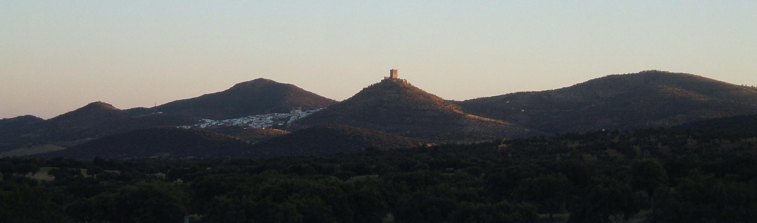 El pueblo de Feria (Badajoz, España) se encuentra en la Sierra de Feria defendido por el castillo de Feria.